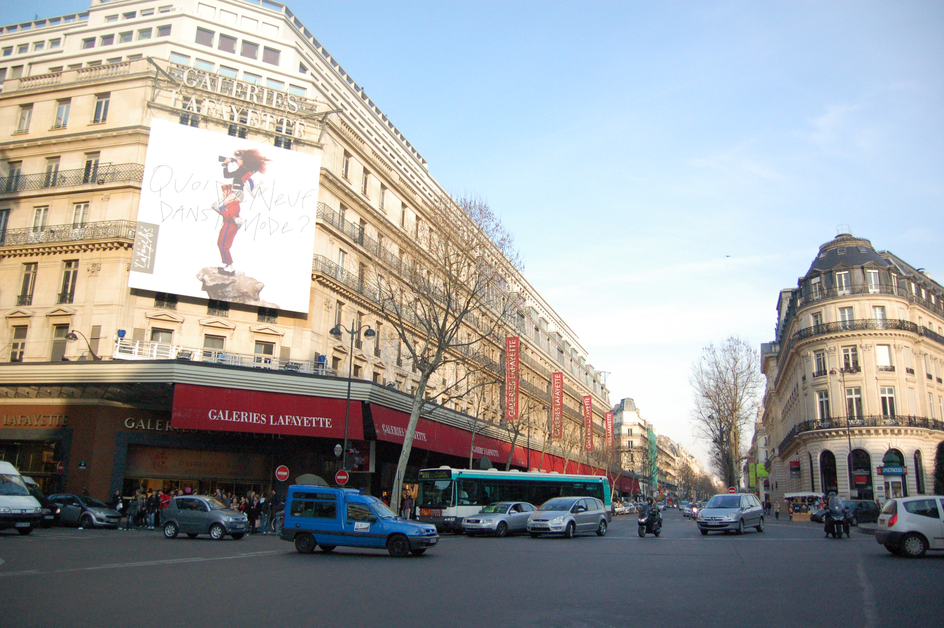 Les galeries lafayettes sur le boulevard Haussman, 2007